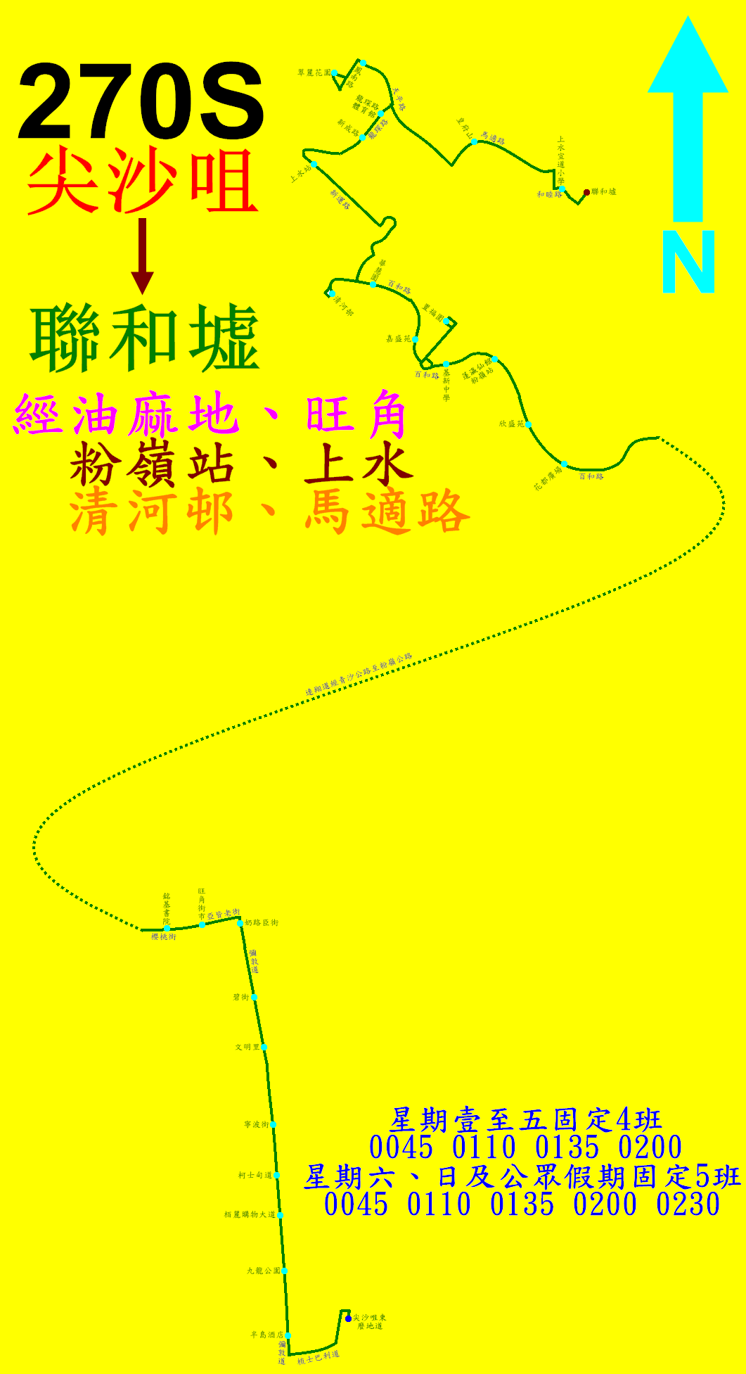 中文（香港）: 九巴270S線的走線圖